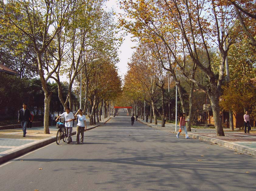 華中農業大學學院路